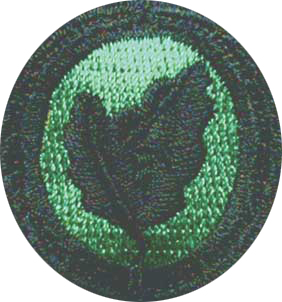 Einzelkämpferabzeichen EK2